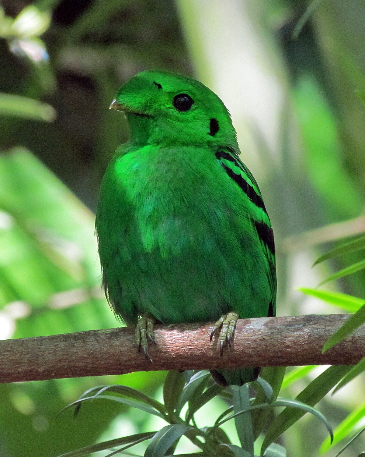 Малый зелёный рогоклюв (Calyptomena viridis)